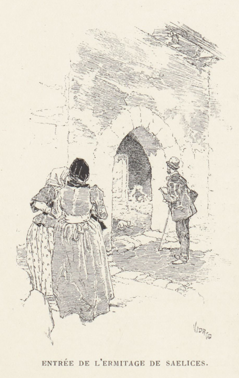 Entrée de l'ermitage de Saelices.